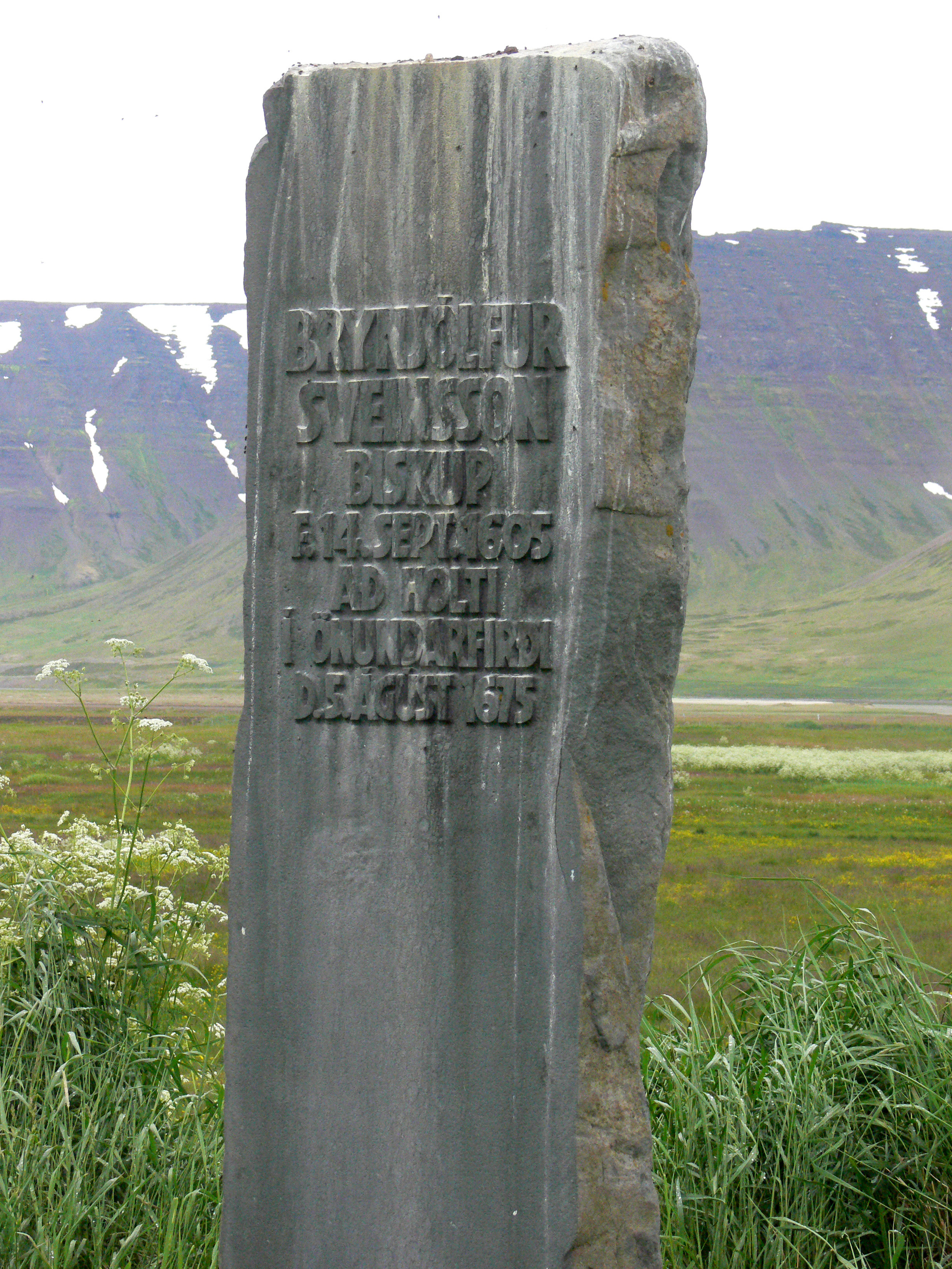 Gedenkstein für Bischof Brynjólvur Sveinsson vor der Kirche Holt im Önundarfjörður.